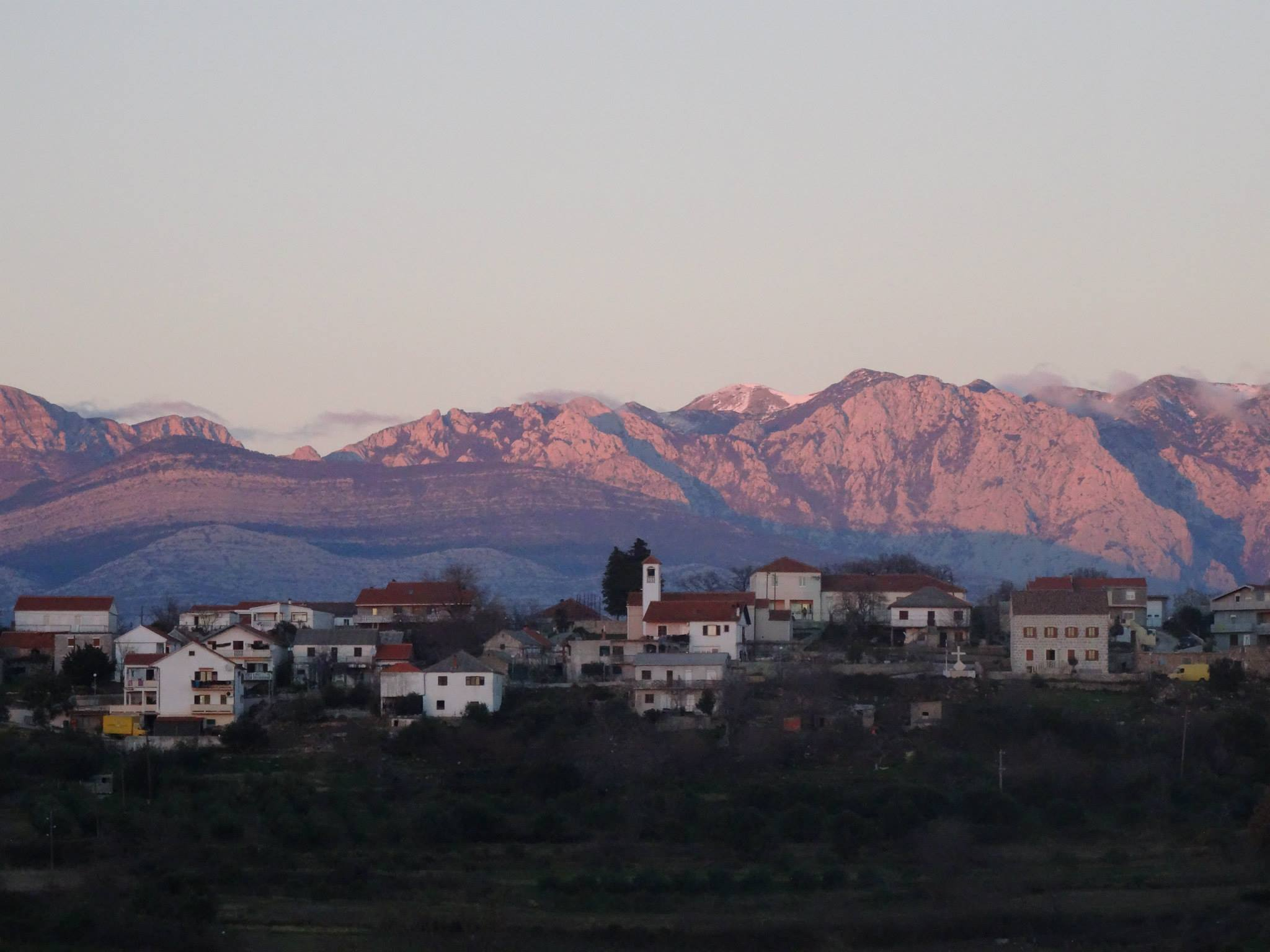 village de Radovin en Croatie